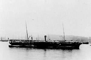 Vapor chileno que participó en la guerra del pacífico en 1879